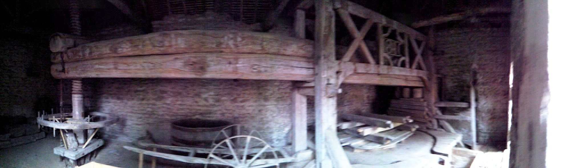 Vue du pressoir situé à côté de la mairie de Dannemoine